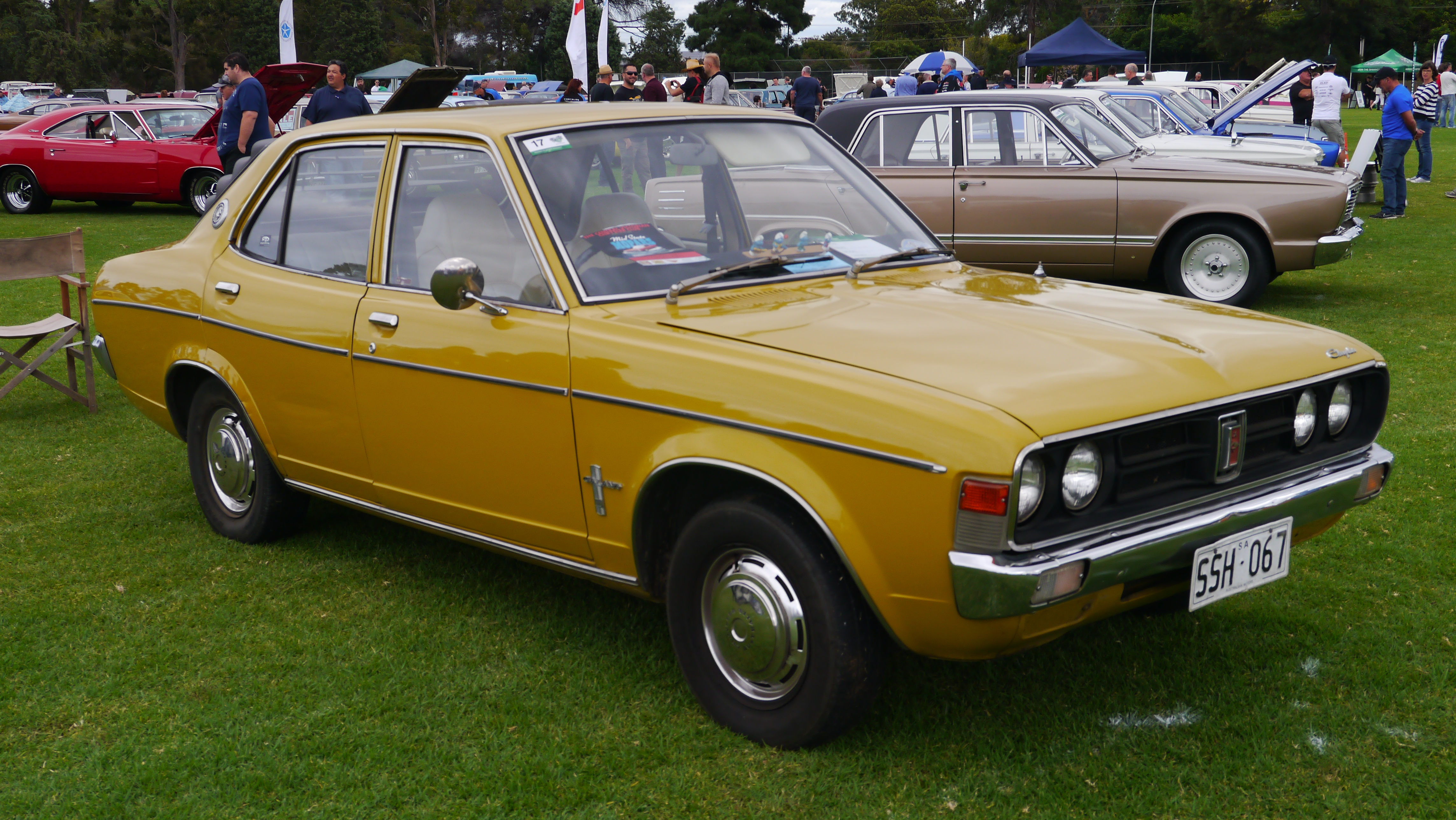 Chrysler Galant GL